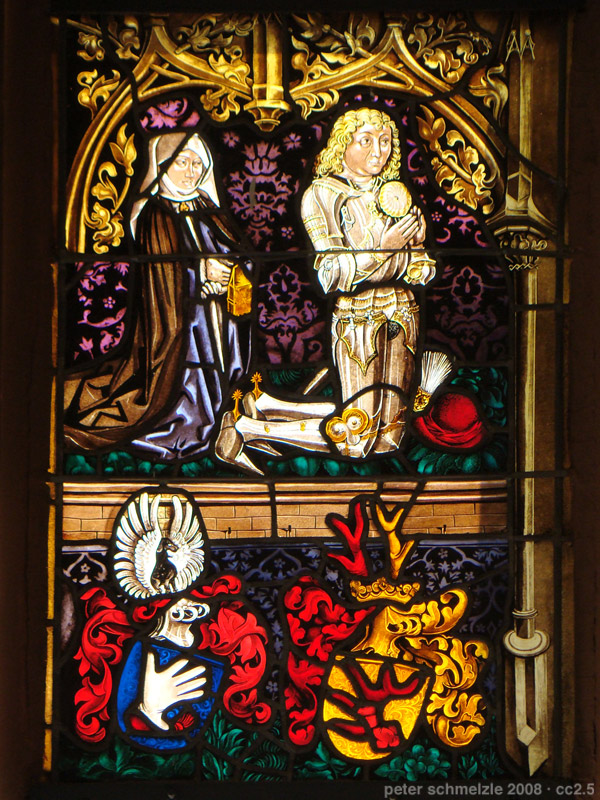 Darstellung des Otto von Hirschhorn und seiner Gemahlin Margarete von Handschuhsheim in der evang. Kirche in Neckarsteinach